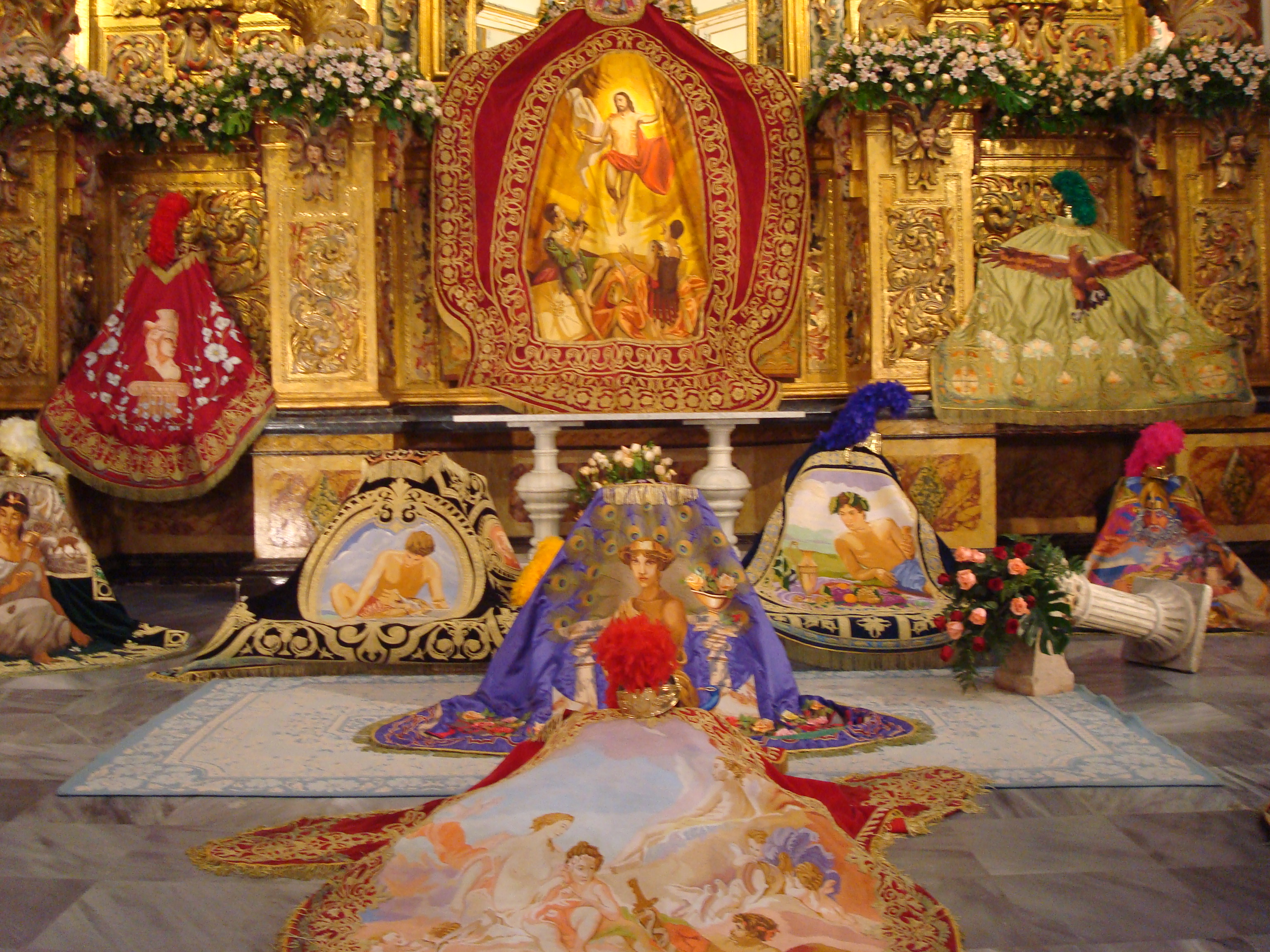 Semana Santa de Lorca